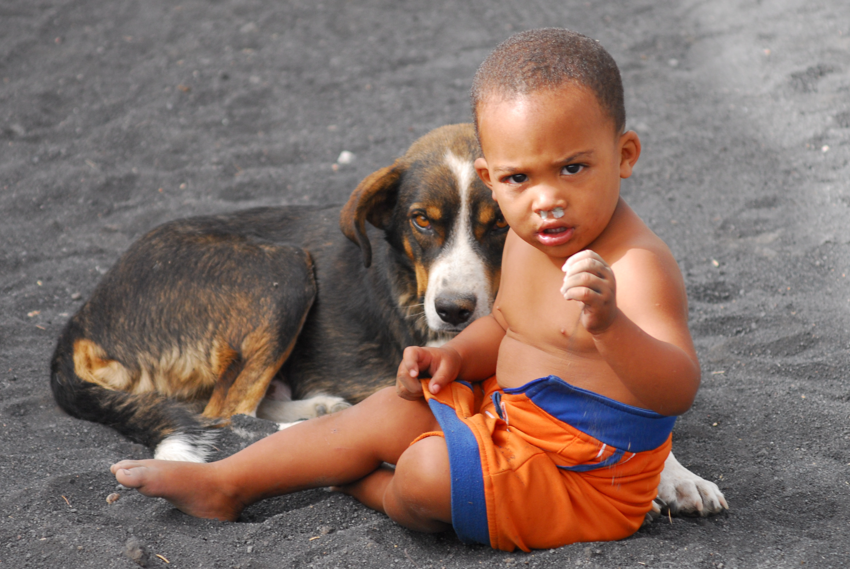 Chã das Caldeiras, Fogo Island, Cape Verde